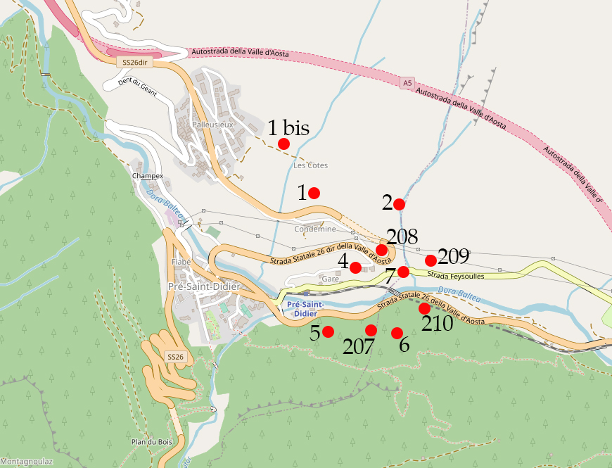 localizzazione delle opere dello Sbarramento di San Desiderio Terme, Pré-Saint-Didier, Valle d'Aosta, Italia. Derivated work personale a partire da : localizzazione punti da Giulio Acuto e Roberto Rovetto, Lo sbarramento di sicurezza di Pré-Saint-Didier, in Pietra e acciaio, a cura dell'Associazione per gli Studi di Storia e Architettura Militare, Edizioni Melli - Borgone, 1999, p. 38. carta Openstreetmap This map may be incomplete, and may contain errors. Don't rely solely on it for navigation.